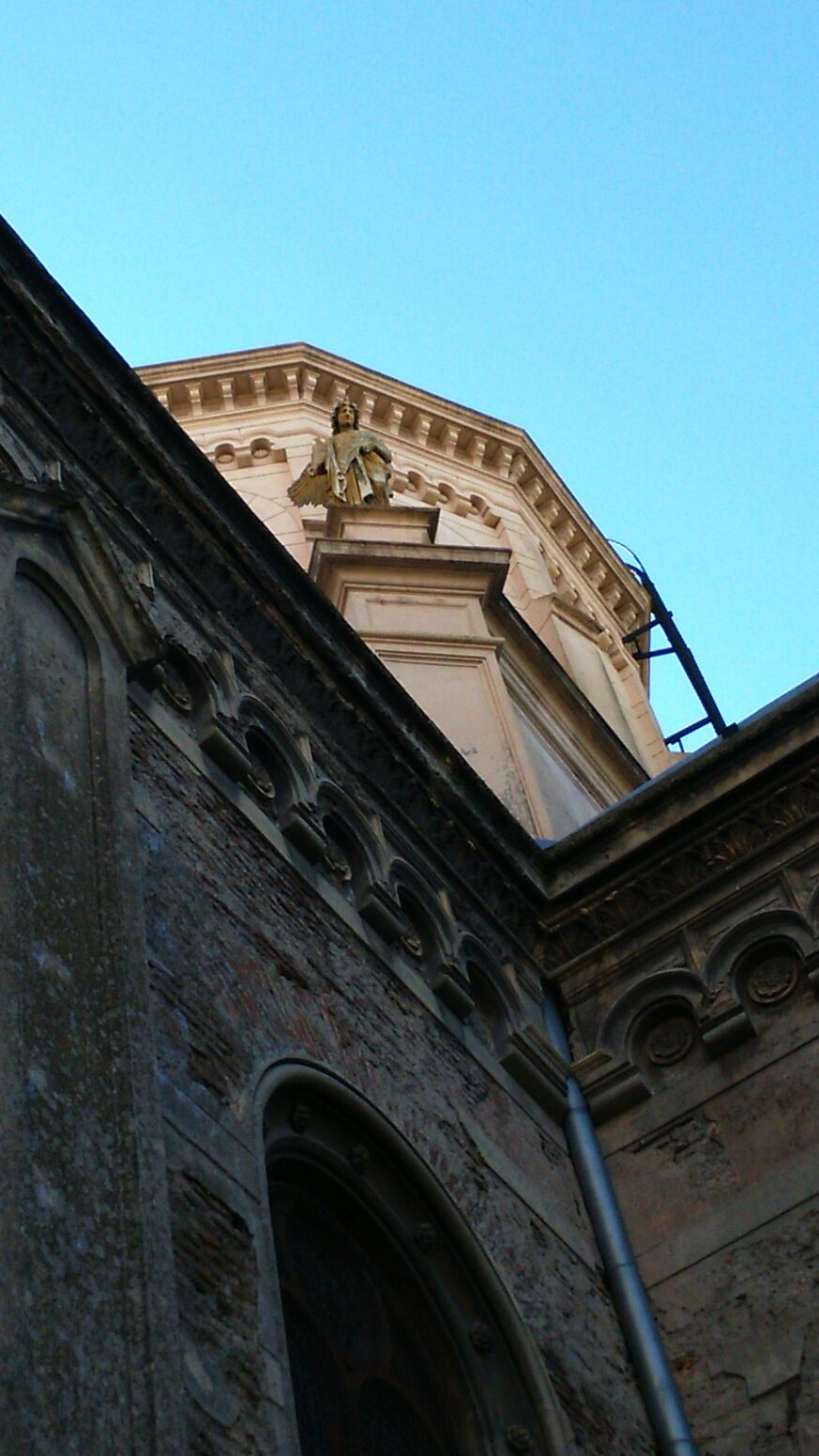 Iglesia Santa Felicitas Esta ubicada en el barrio de Barracas, en la calle Isabel La Católica, en la Ciudad Autónoma de Buenos Aires. Fue construida en el año 1880 y lleva ese nombre debido a que allí asesinaron a la joven Felicitas Guerrero de Alzaga. Sus padres en su honor construyeron el edificio. Este es un lugar de muchos mitos ya que se dice que el fantasma de la hermosa mujer ronda cada 30 de enero vestida de blanco y llorando por la iglesia.